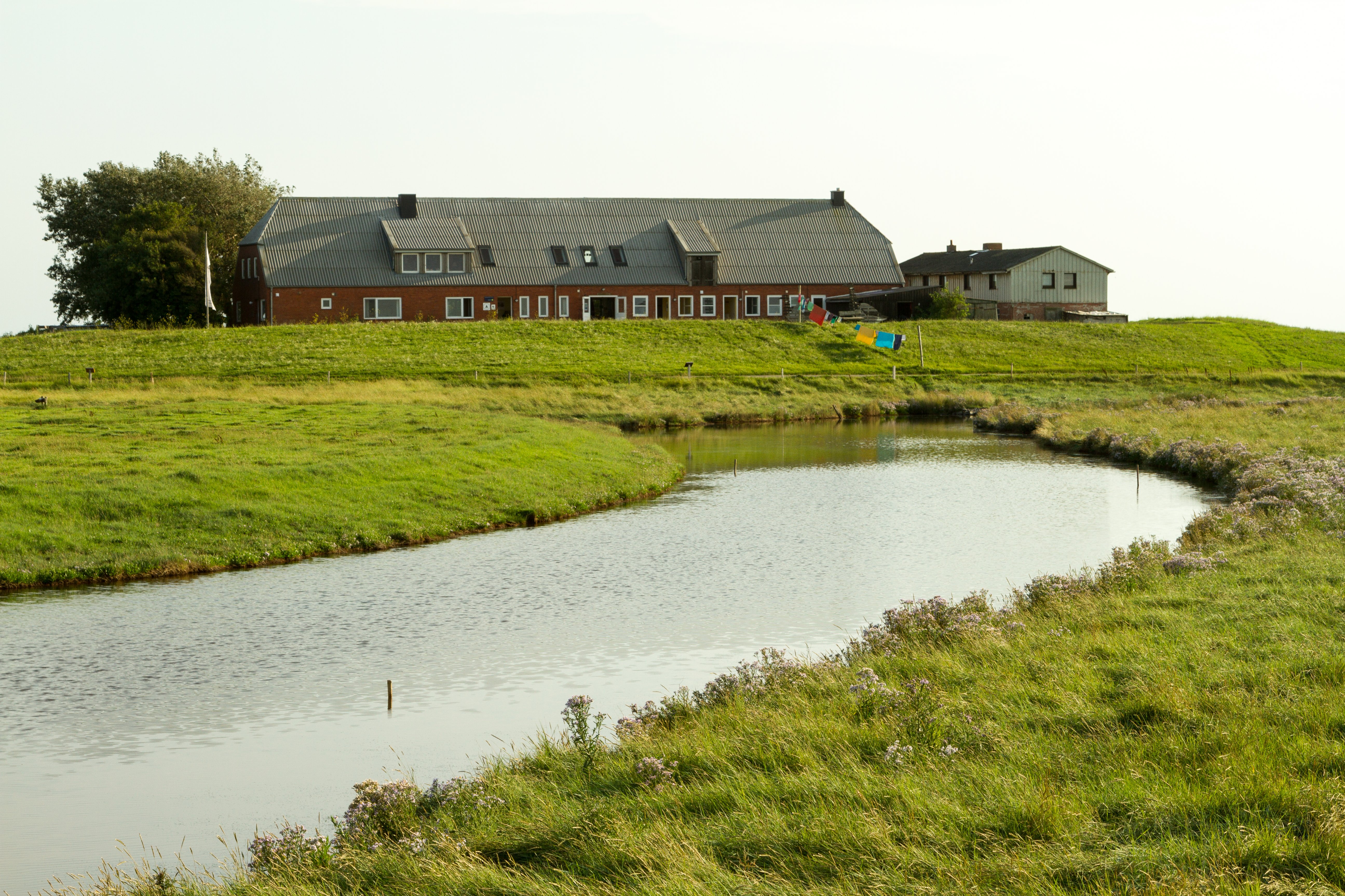 Seminar- und Gruppenhaus der Schutzstation Wattenmeer auf der Hallig Langeneß